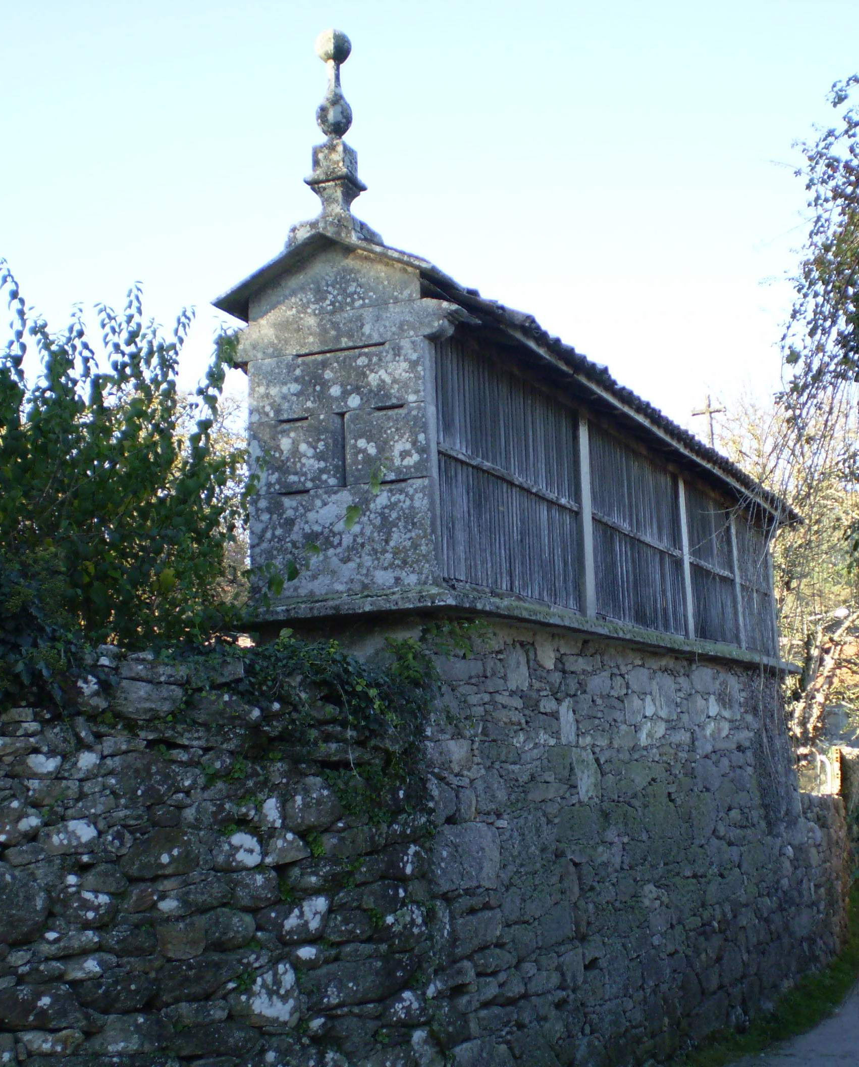 Hórreo, de tipo mahía, sobre soleira de mampostería. Catro claros e adornado con cruz latina e lampión. No lugar de Toande (Antas de Ulla)